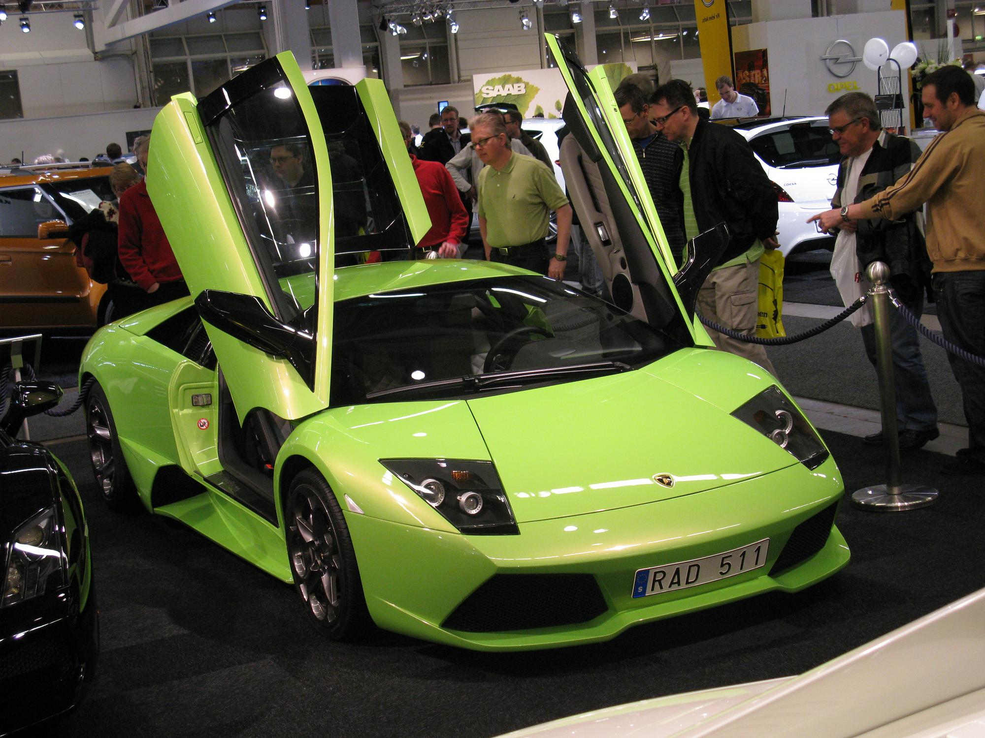 Lamborghini Murchielago